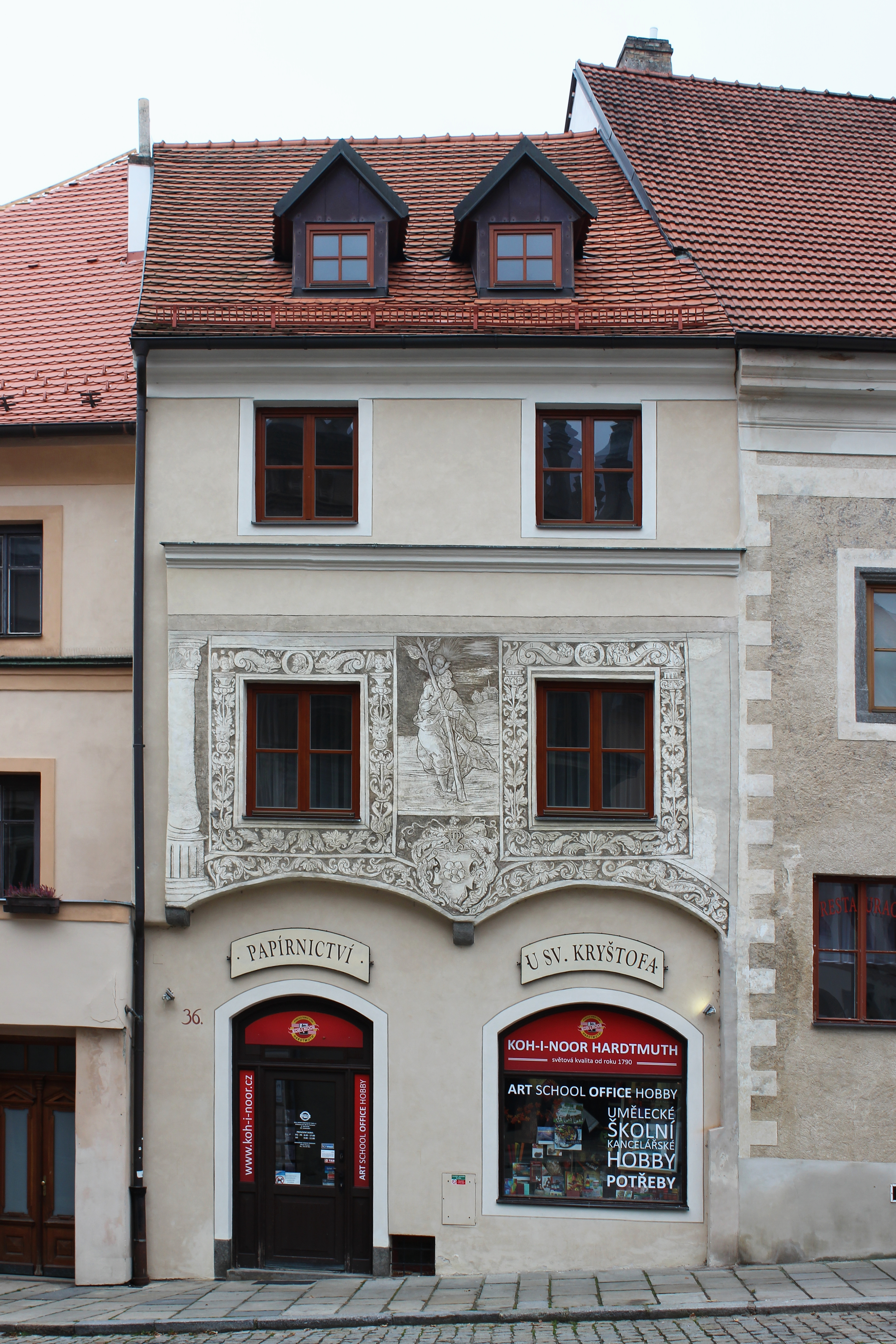 Prachatice